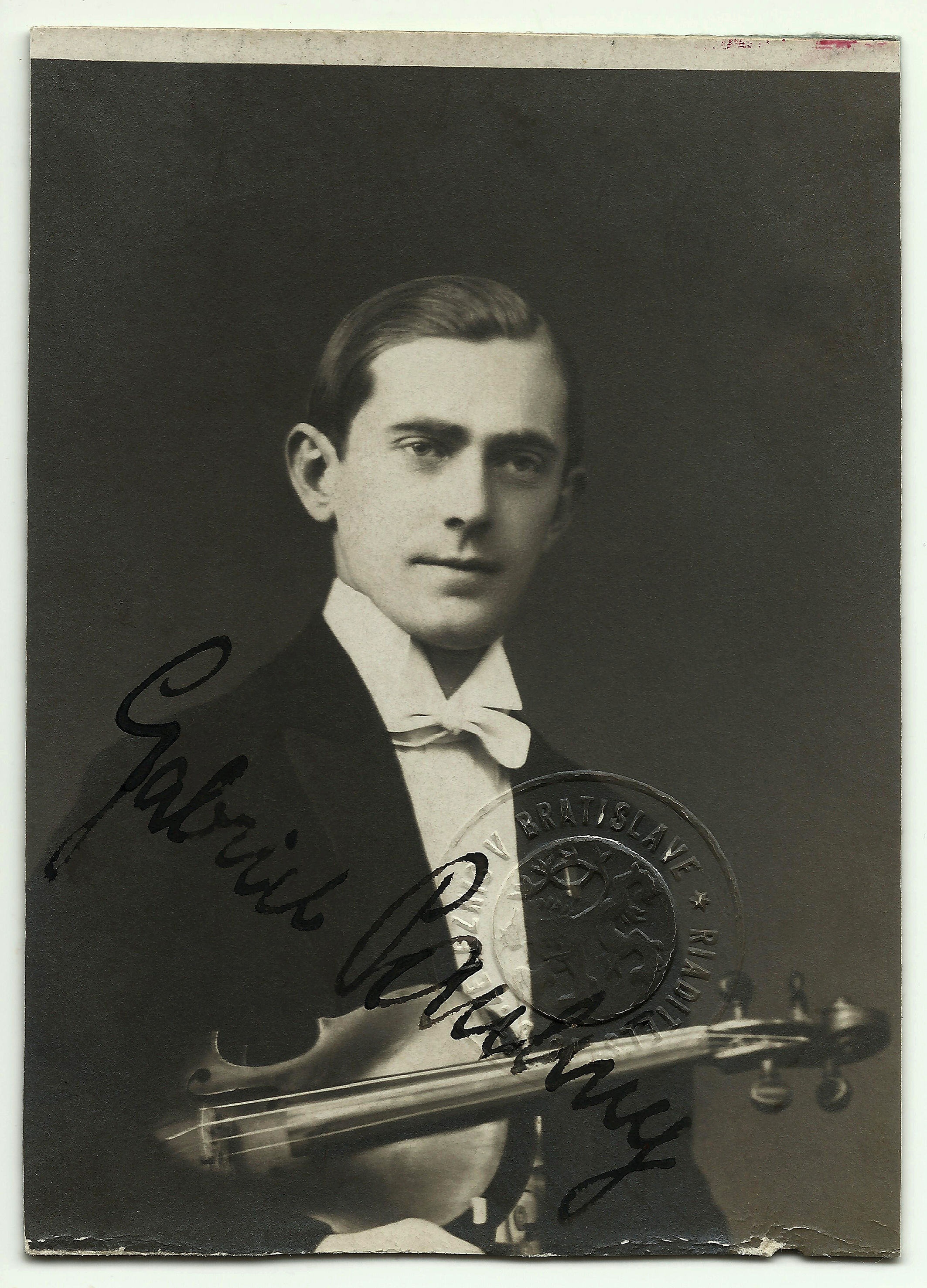 Prof. Gabriel Paulíny